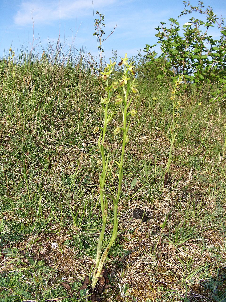 Ophrys araneola - plants